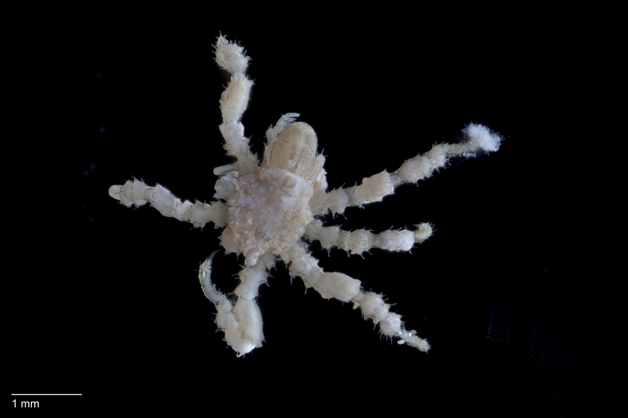 Achelia shepherdi